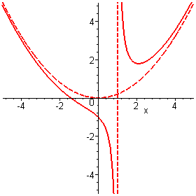 Beispiel für Asymptoten einer Funktion: Die Funktion f 2 ( x ) = x 3 − x 2 + 5 5 x − 5 = 1 5 x 2 + 1 x − 1 {\displaystyle f_{2}(x)={\frac {x^{3}-x^{2}+5}{5x-5 ={\frac {1}{5 x^{2}+{\frac {1}{x-1 } hat die senkrechte Asymptote x = 1 und (wenn man Polynome als schräge Asymptoten zulässt) die schräge Asymptote p ( x ) = 1 / 5 ⋅ x 2 {\displaystyle p(x)=1/5\cdot x^{2 . Selbstgemacht von Benutzer:SirJective.